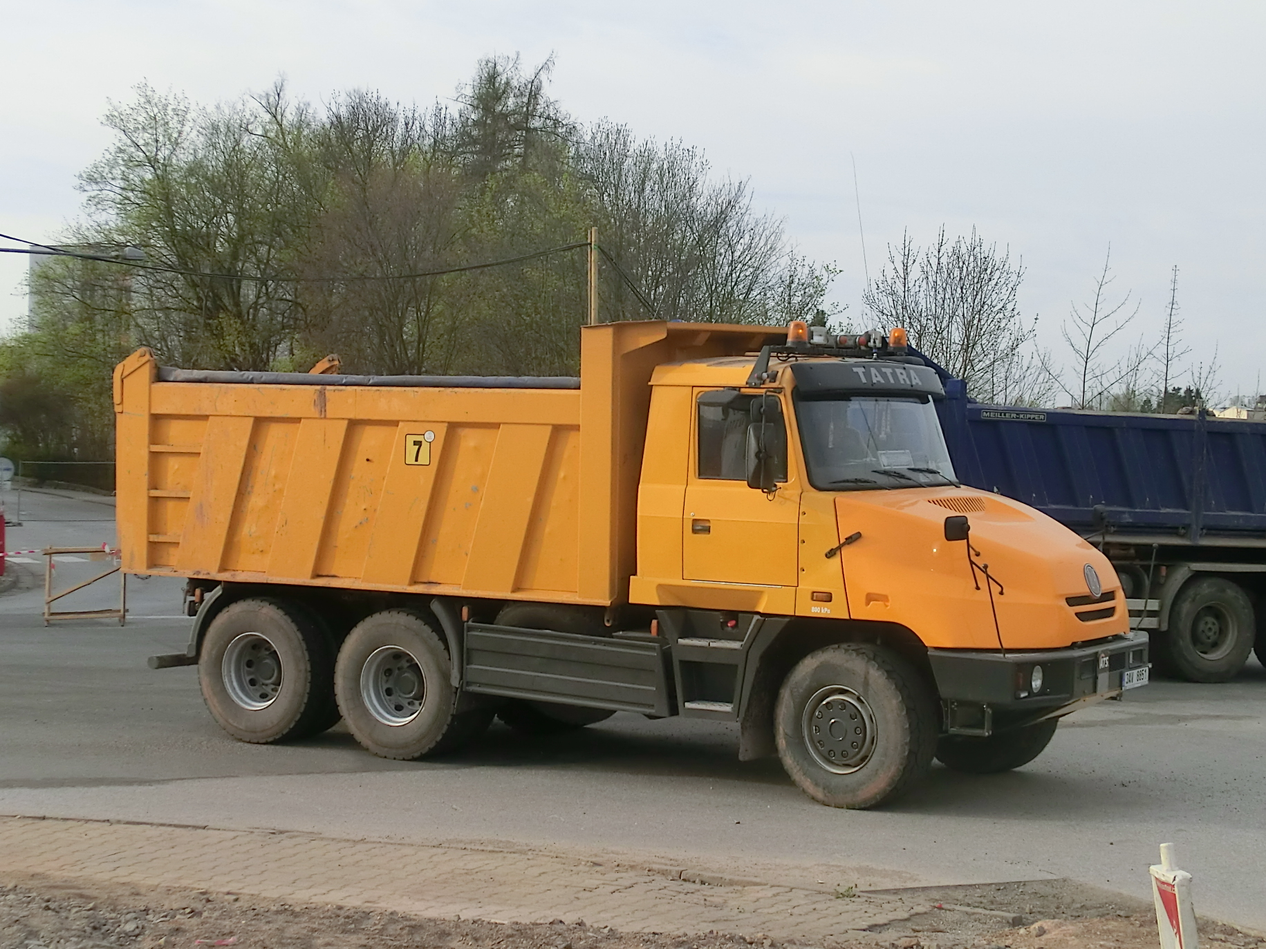 Tatra Jamal při zemních pracích ve Vrchlabí